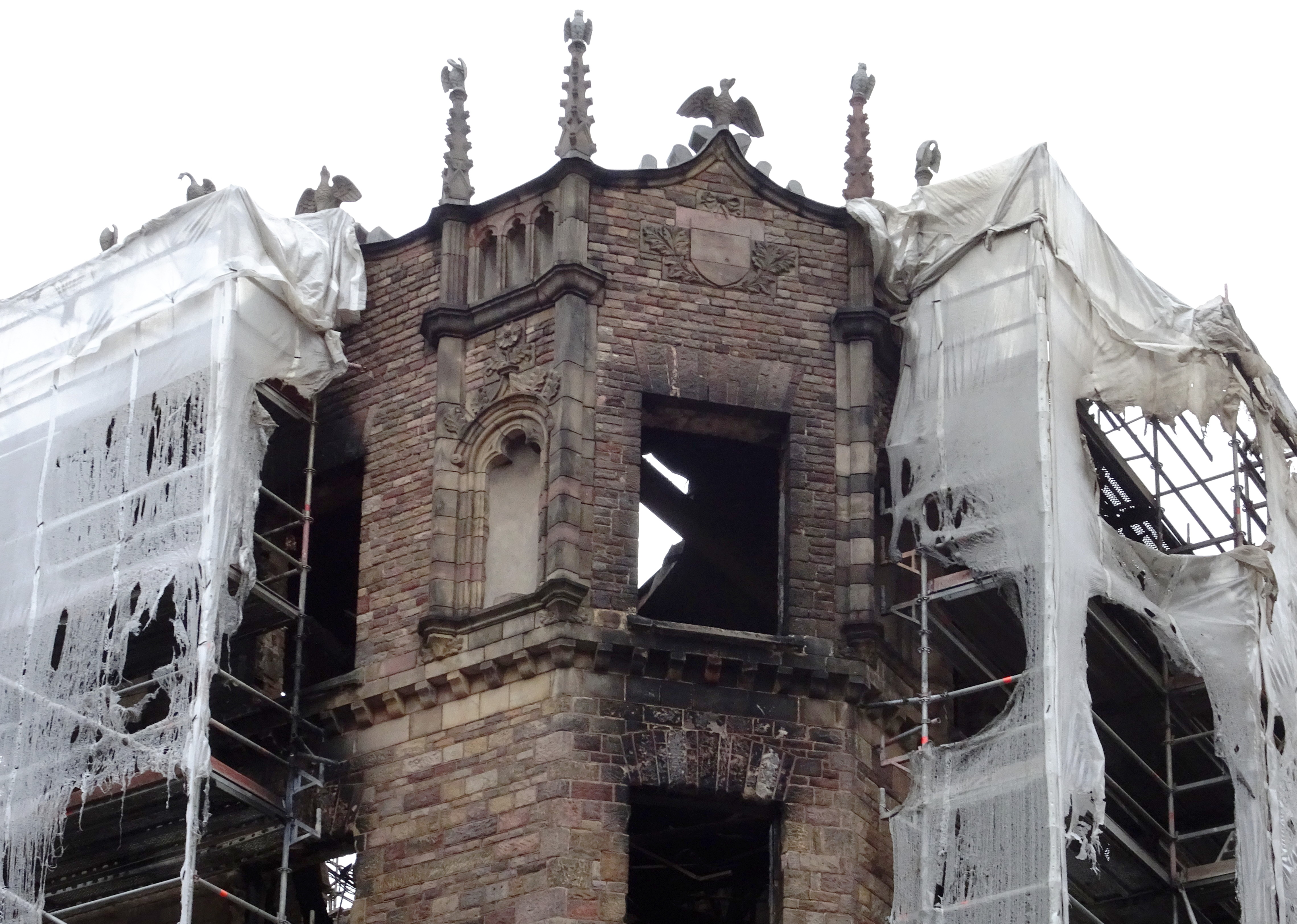 Fastigheten Vildmannen 7 ligger i korsningen Biblioteksgatan och Jakobsbergsgatan och uppfördes mellan 1895 och 1897. Huset brann ner i november 2017. Erik Josephson (Arkitekt).